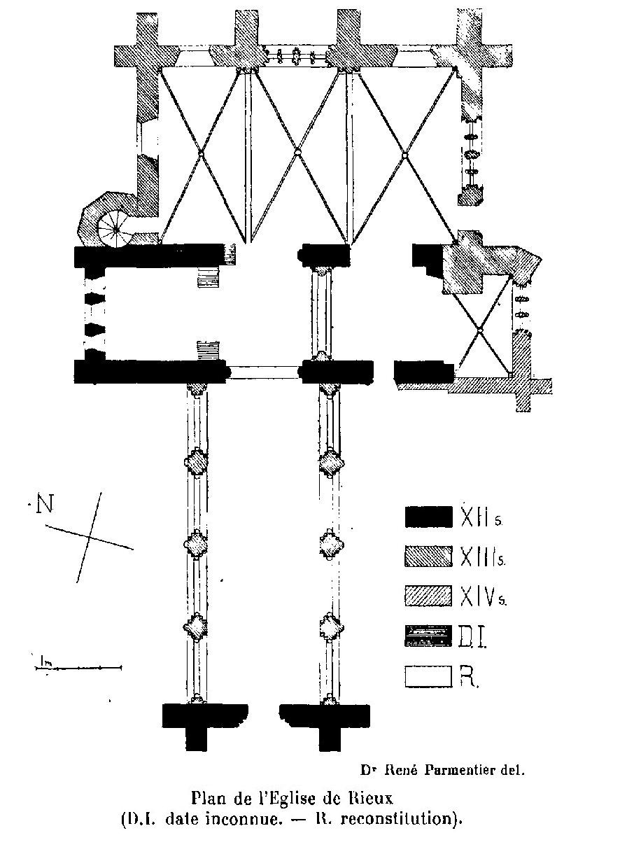 Plan des masses de l'église Saint-Denis